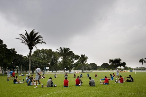 Sede deportiva Club Blooming